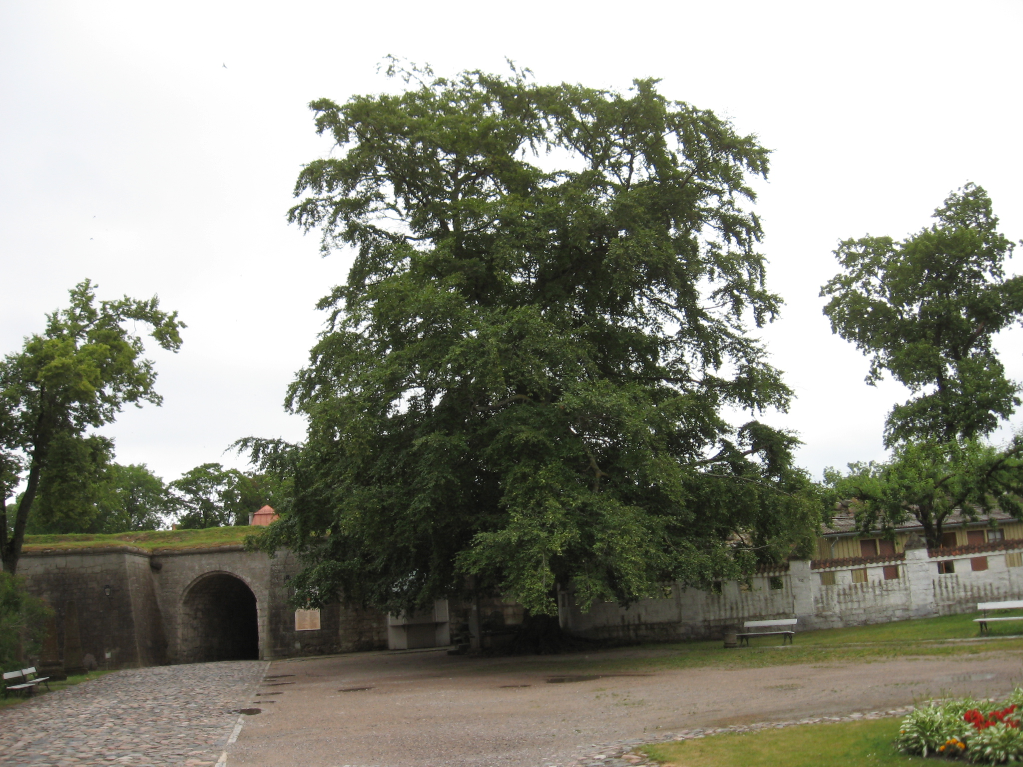 Harilik pöök Kursessaare lossis